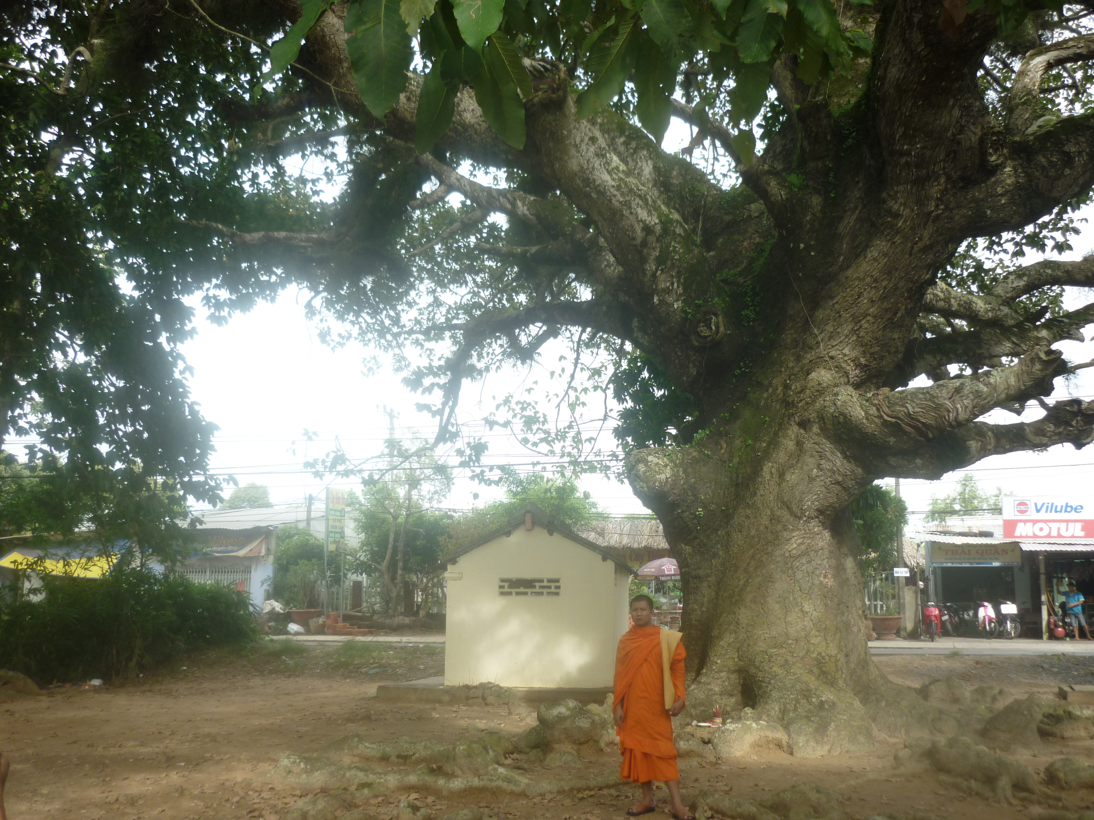 Cây Thần Linh ngàn tuổi của Việt Nam...